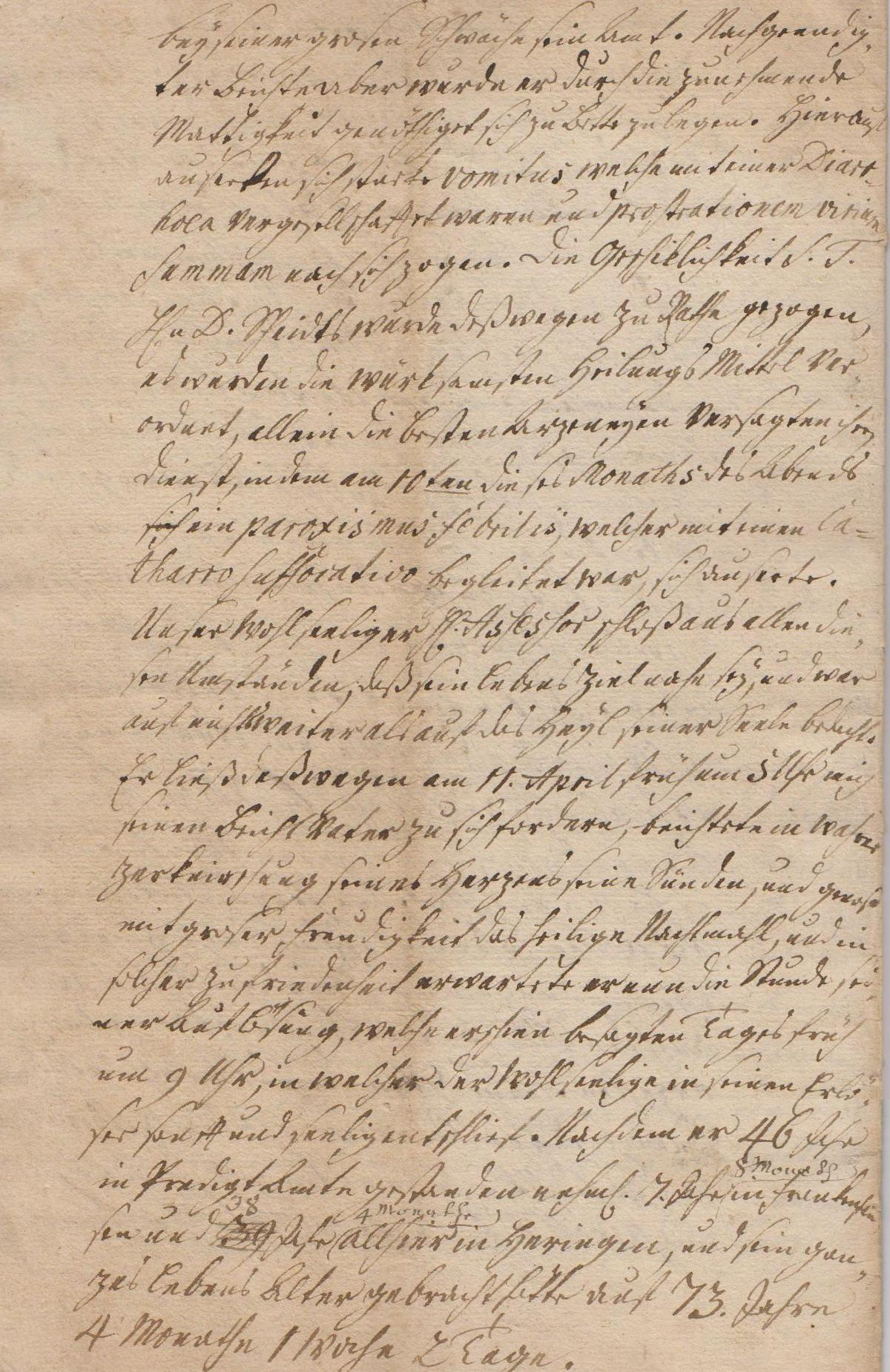 Seite 20 der Leichenpredigt für den Pastor August Wilhelm Reinhart (1696/1770), Bürger der Stadt Heringen an der Helme.